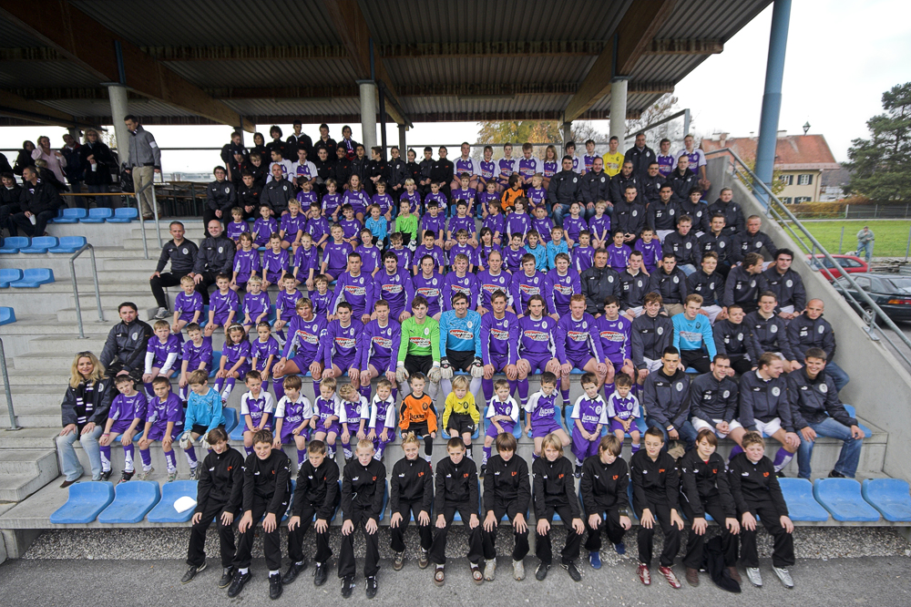 Sämtliche Mannschaften der Salzburger Austria; 2007